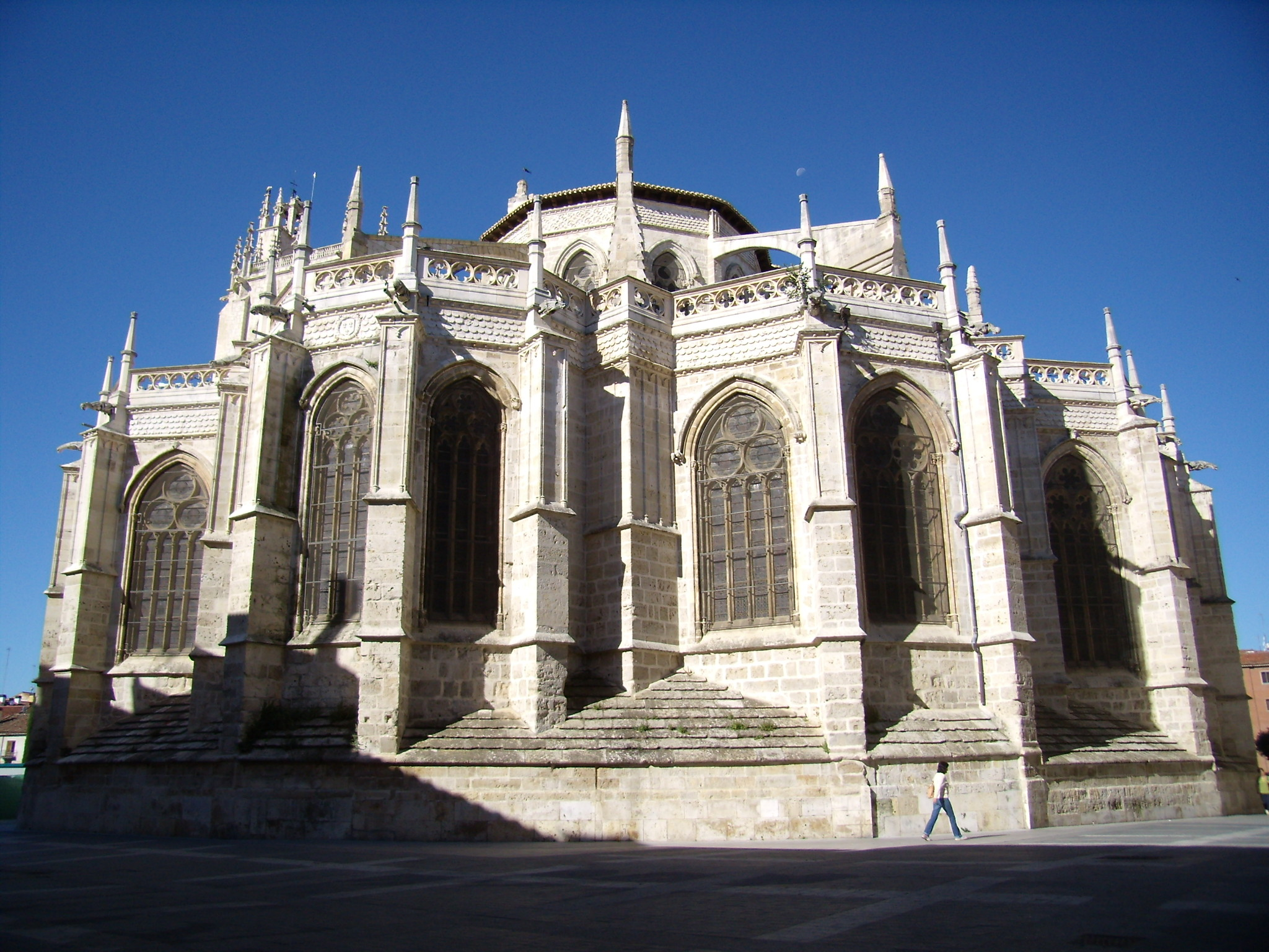 Imagen del ábside de la Catedral de Palencia.